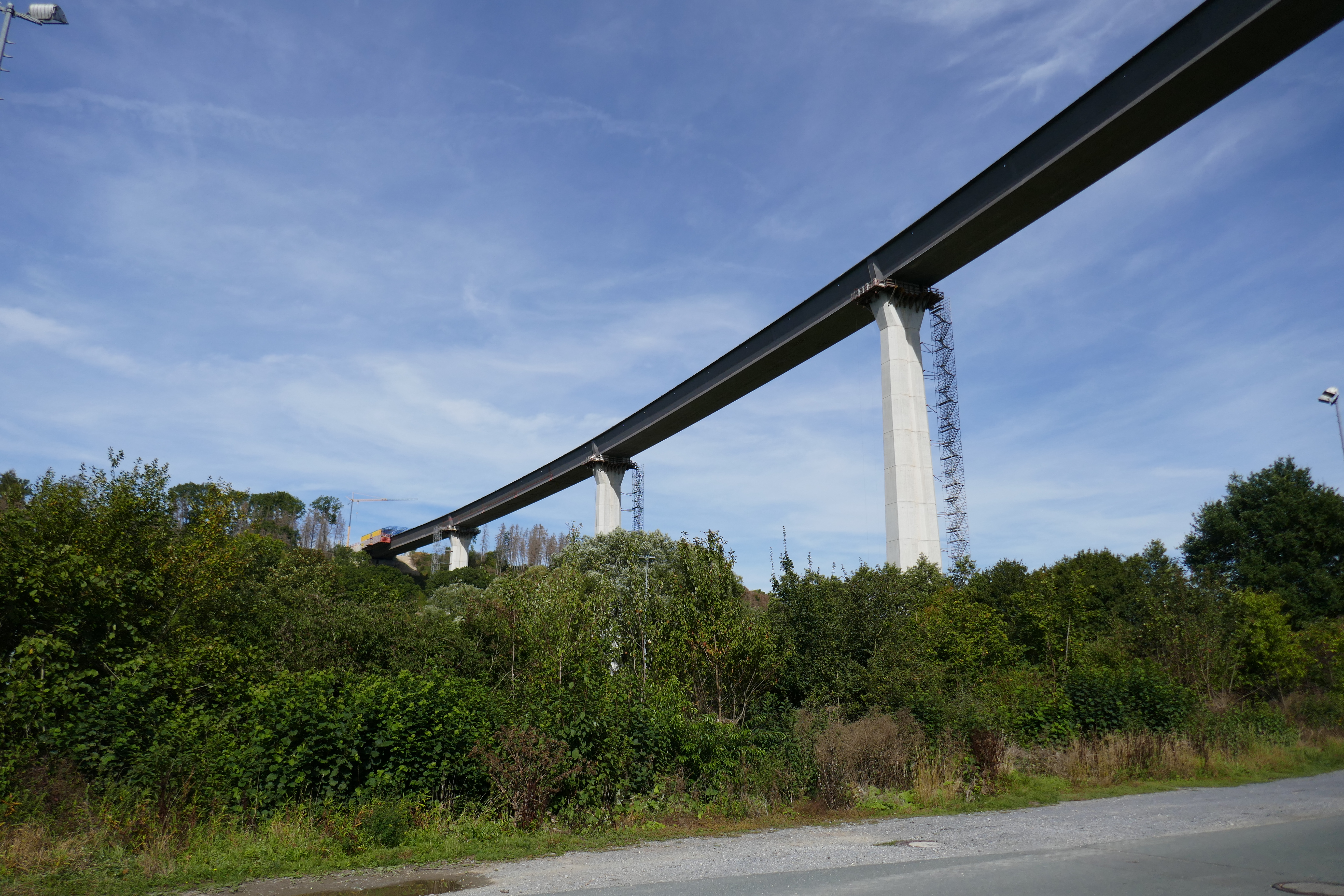 Aftetal und Aftetalbrücke zwischen Leiberg und Bad Wünnenberg